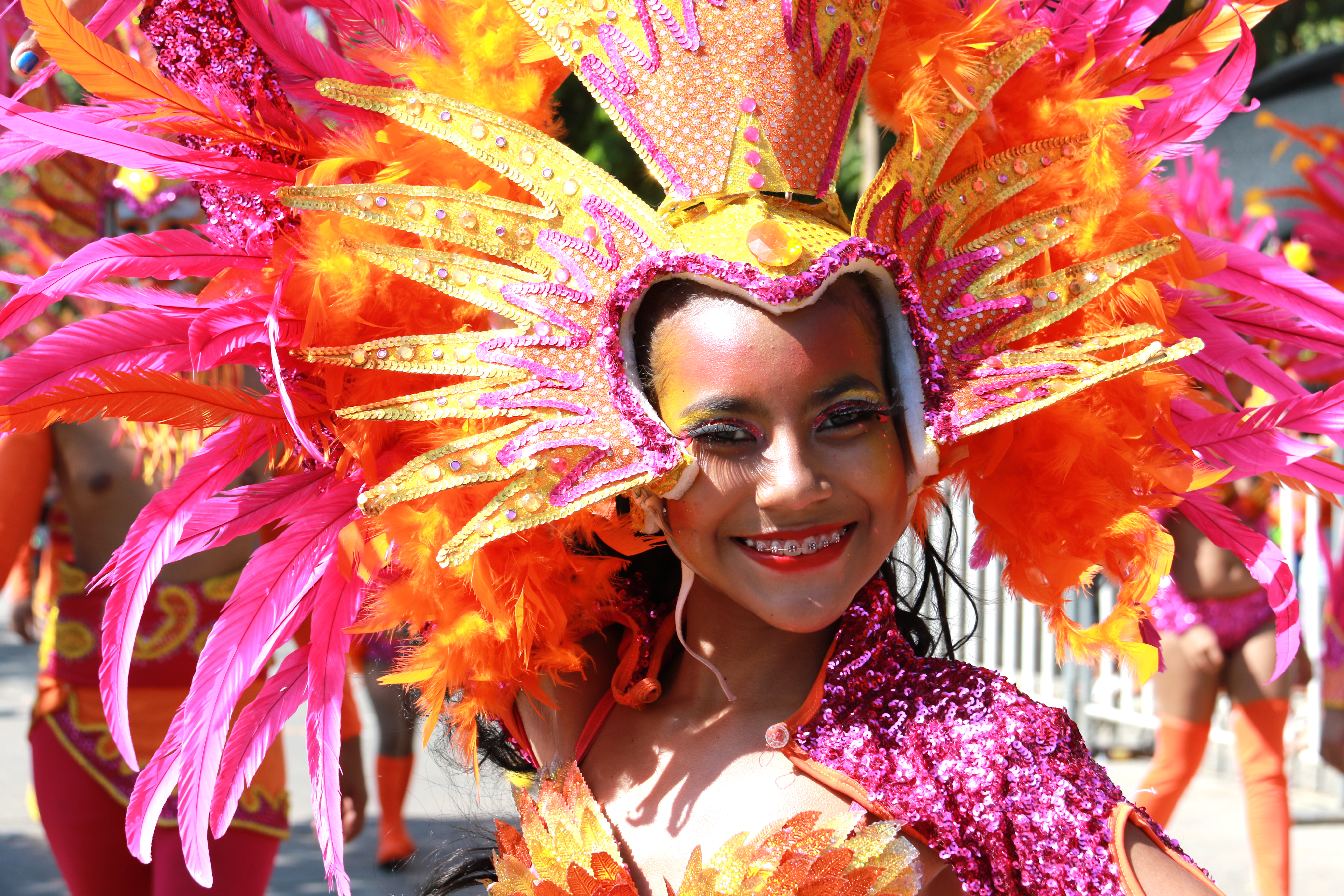 Colombie, carnaval de Baranquilla